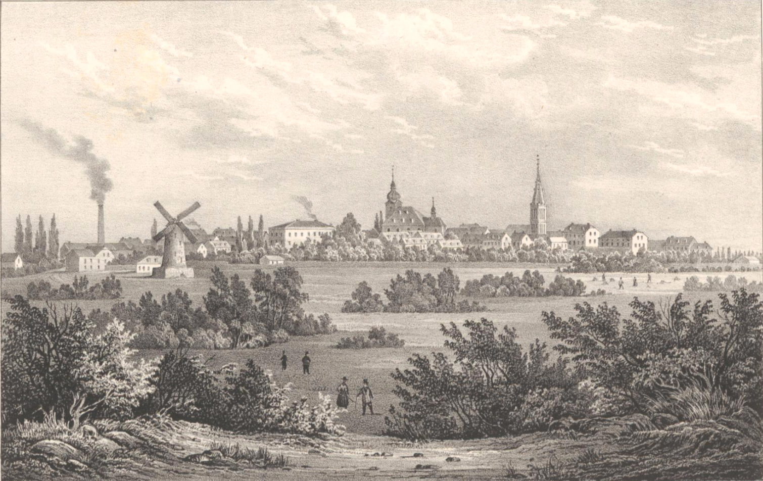 Crefeld, Lithographie : 20 x 12 cm, Heinrich Wilhelm Teichgräber